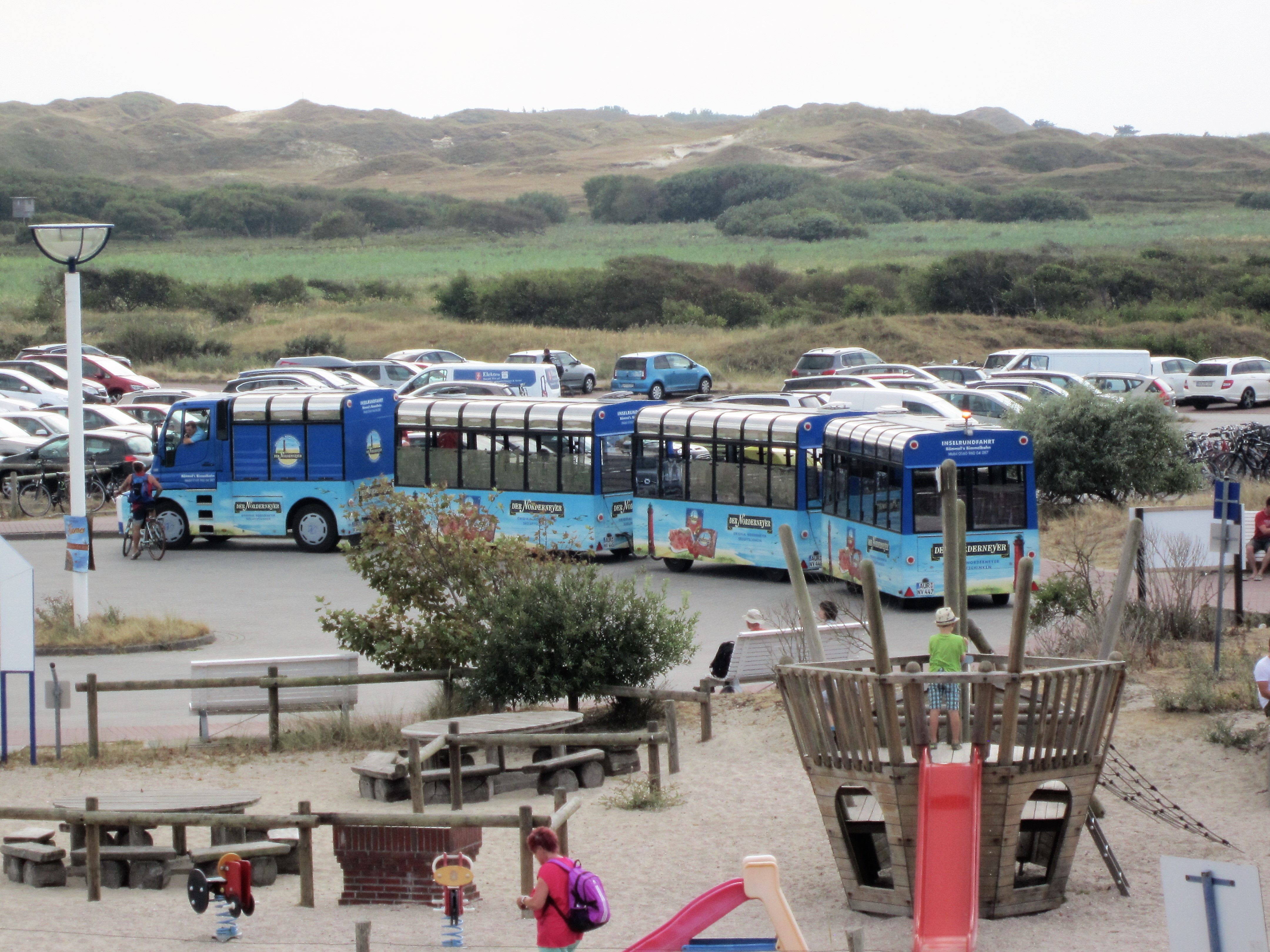 Halt der Bimmelbahn beim Zugang zum Nordstrand von Norderney